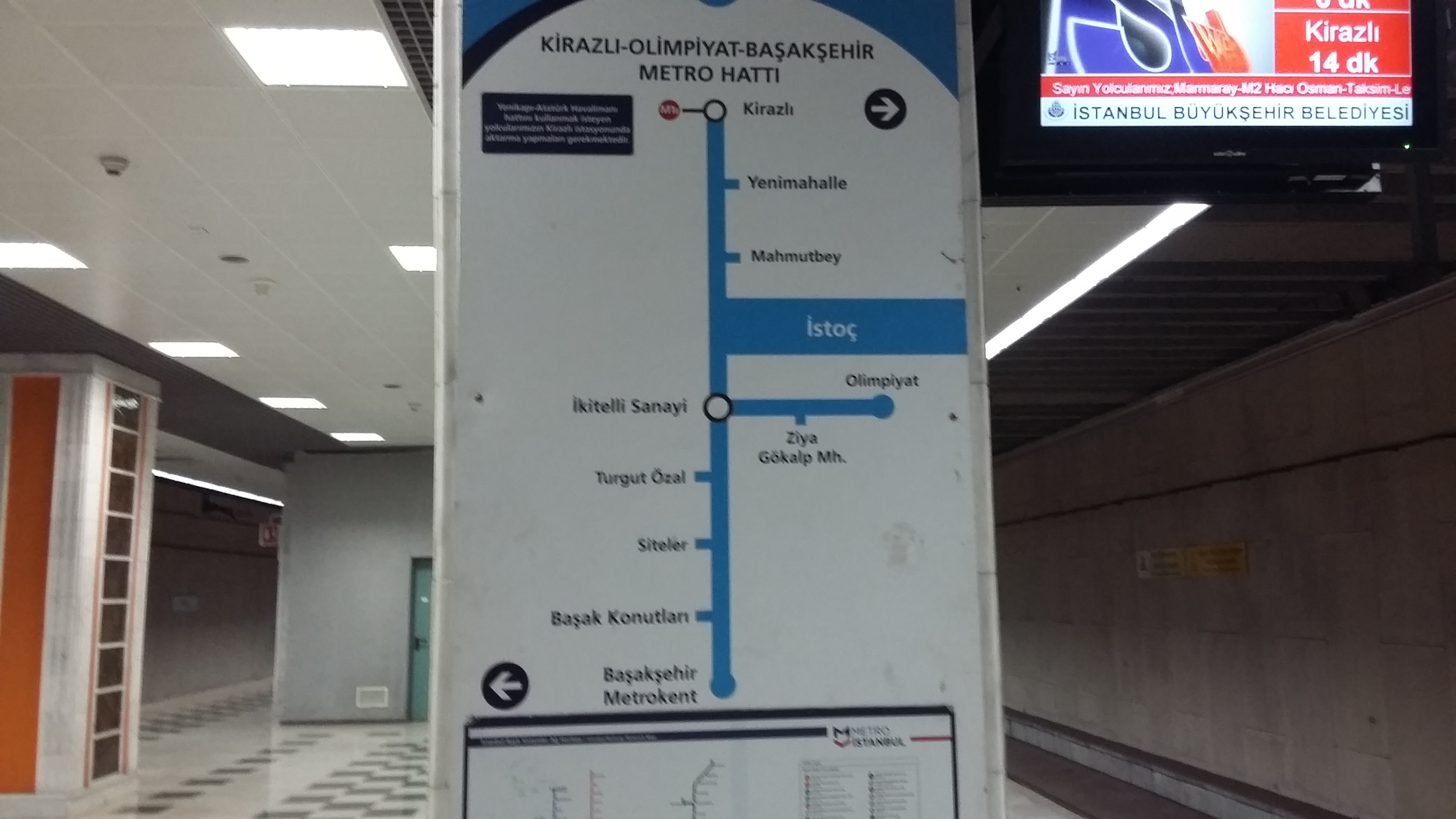 M3 Kirazlı - Olimpiyat - Başakşehir